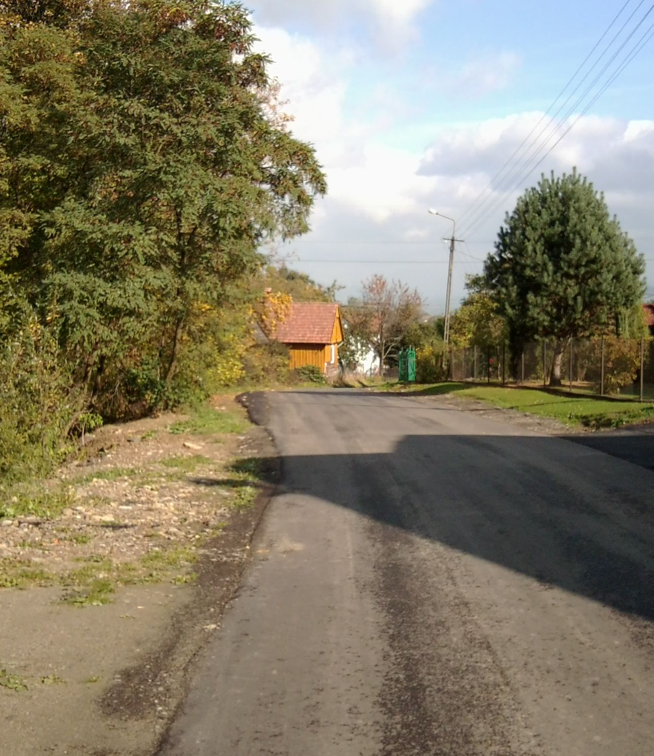 Ulica Leśna w Radziechowach